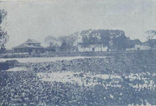 铁展 1934-1 粤汉铁路株韶段衡阳西湖